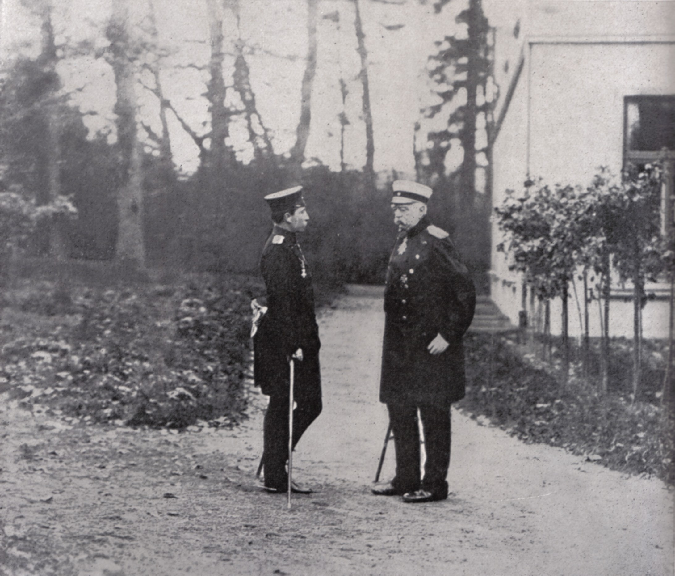 Der junge Kaiser Wilhelm II und Fürst Bismarck, in Friedrichsruh 1888 (1883?)